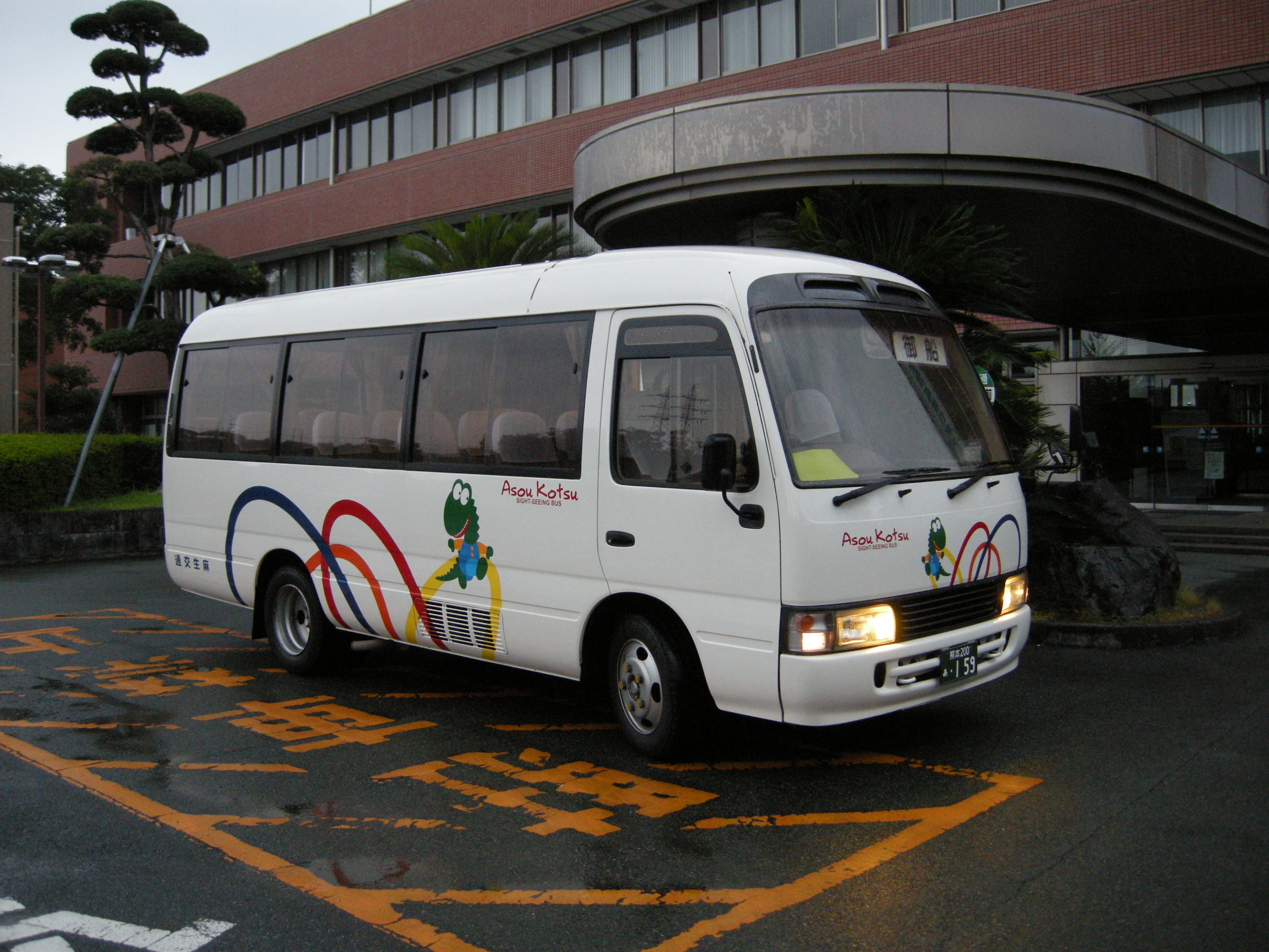 麻生交通 路線バスの車両1